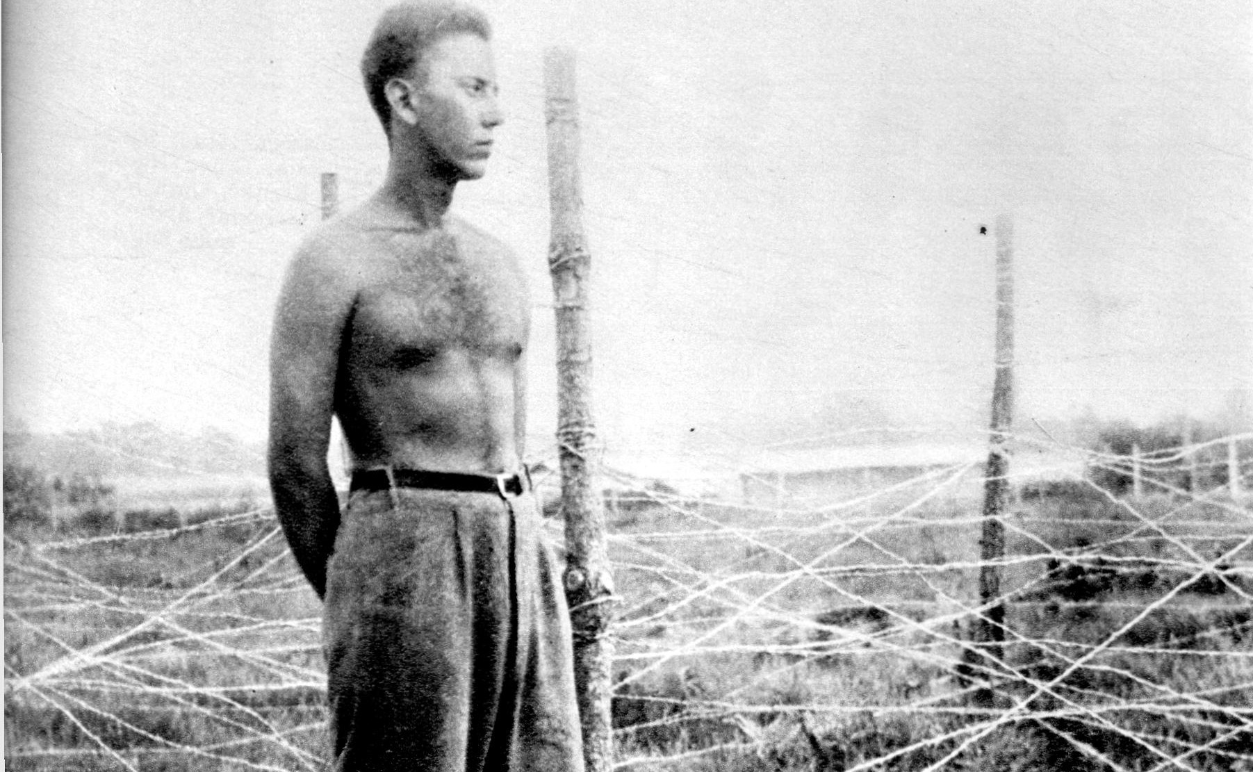 Slobodan Mitrov - Danko u francuskom logoru Girs 1939. godine.